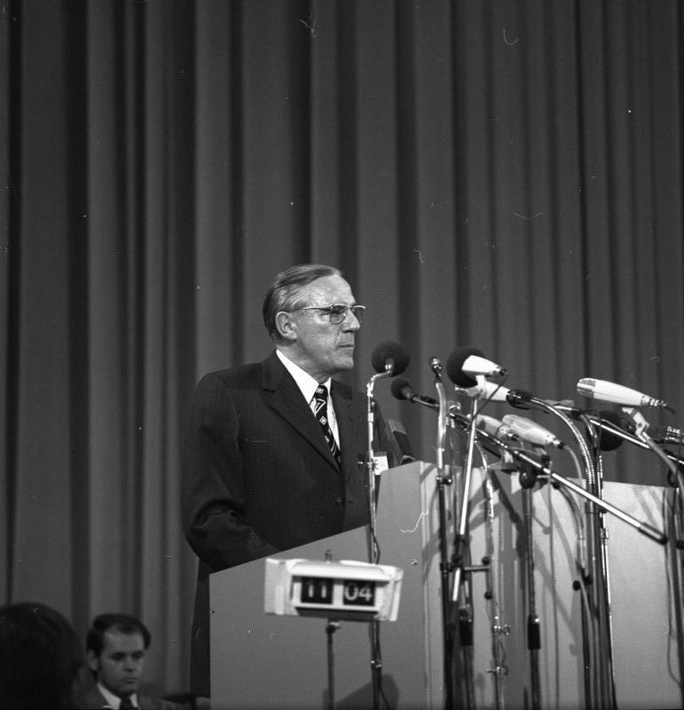 CSU-Parteitag 1975 in der Bayernhalle, München (Prof. Dr. Karl Steinbuch)